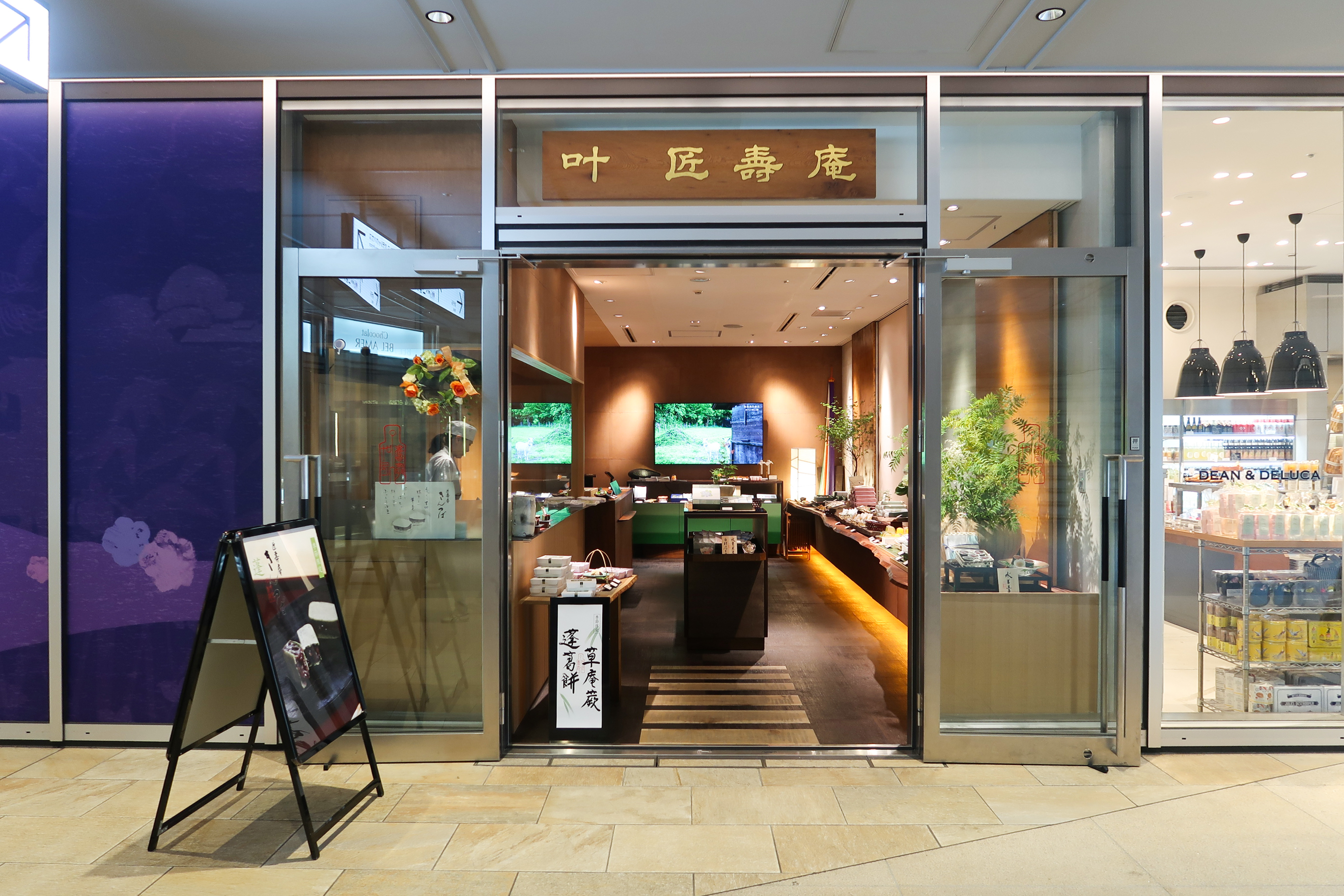 叶 匠壽庵東京ガーデンテラス紀尾井町店